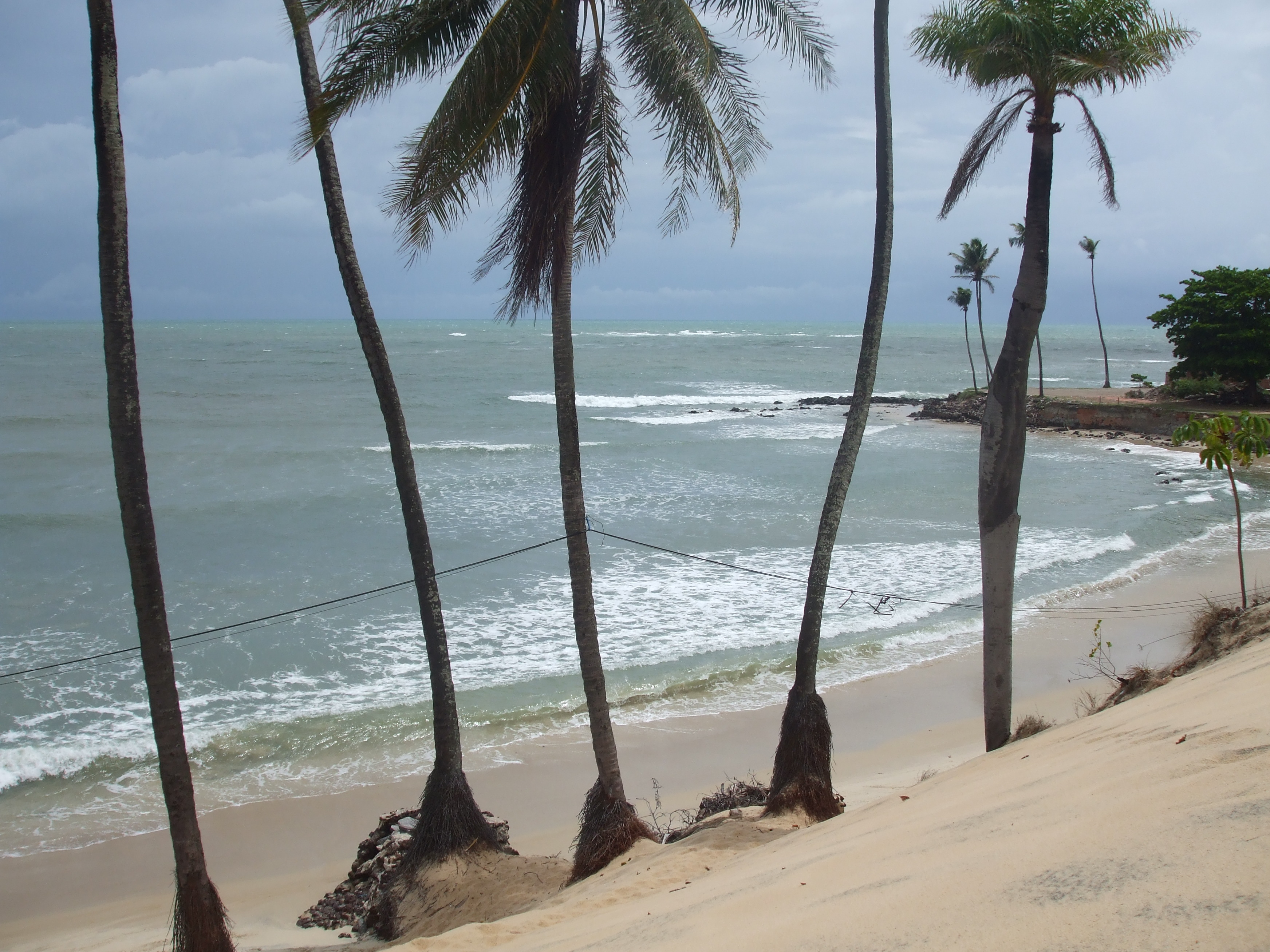 Extremoz - State of Rio Grande do Norte, 59575-000, Brazil